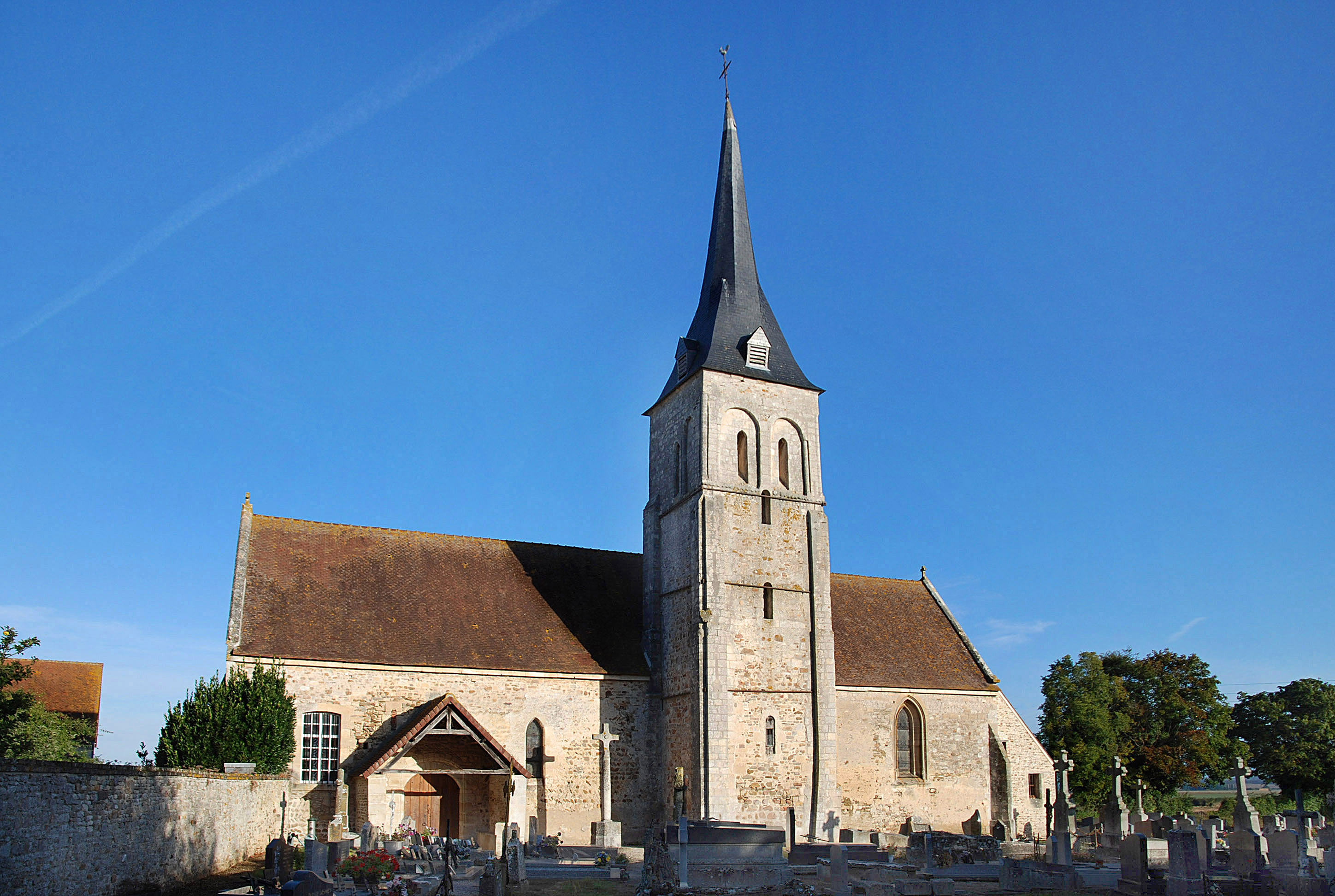 Merri (Orne)